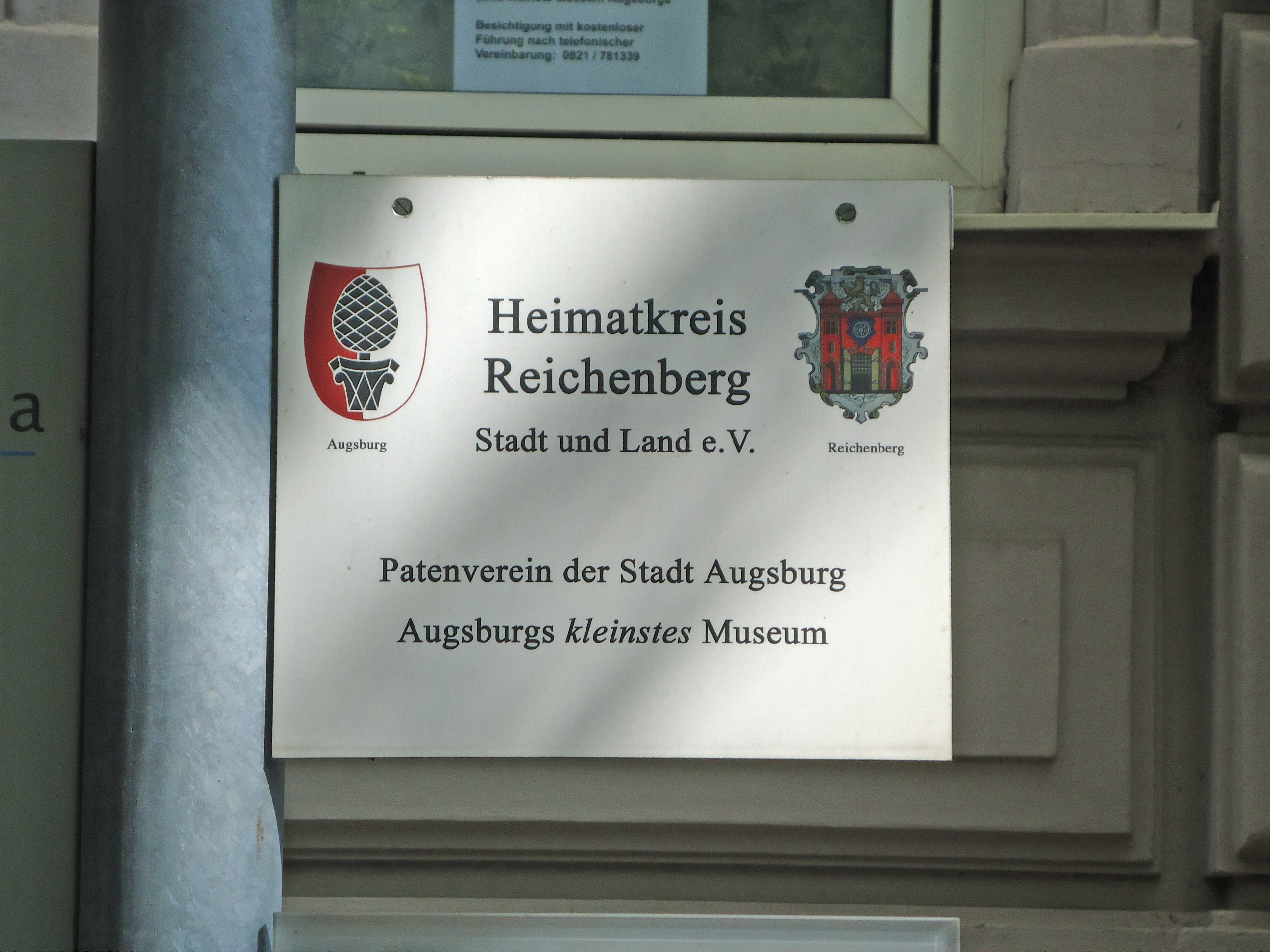 Schild zur Heimatstube Reichenberg in Augsburg